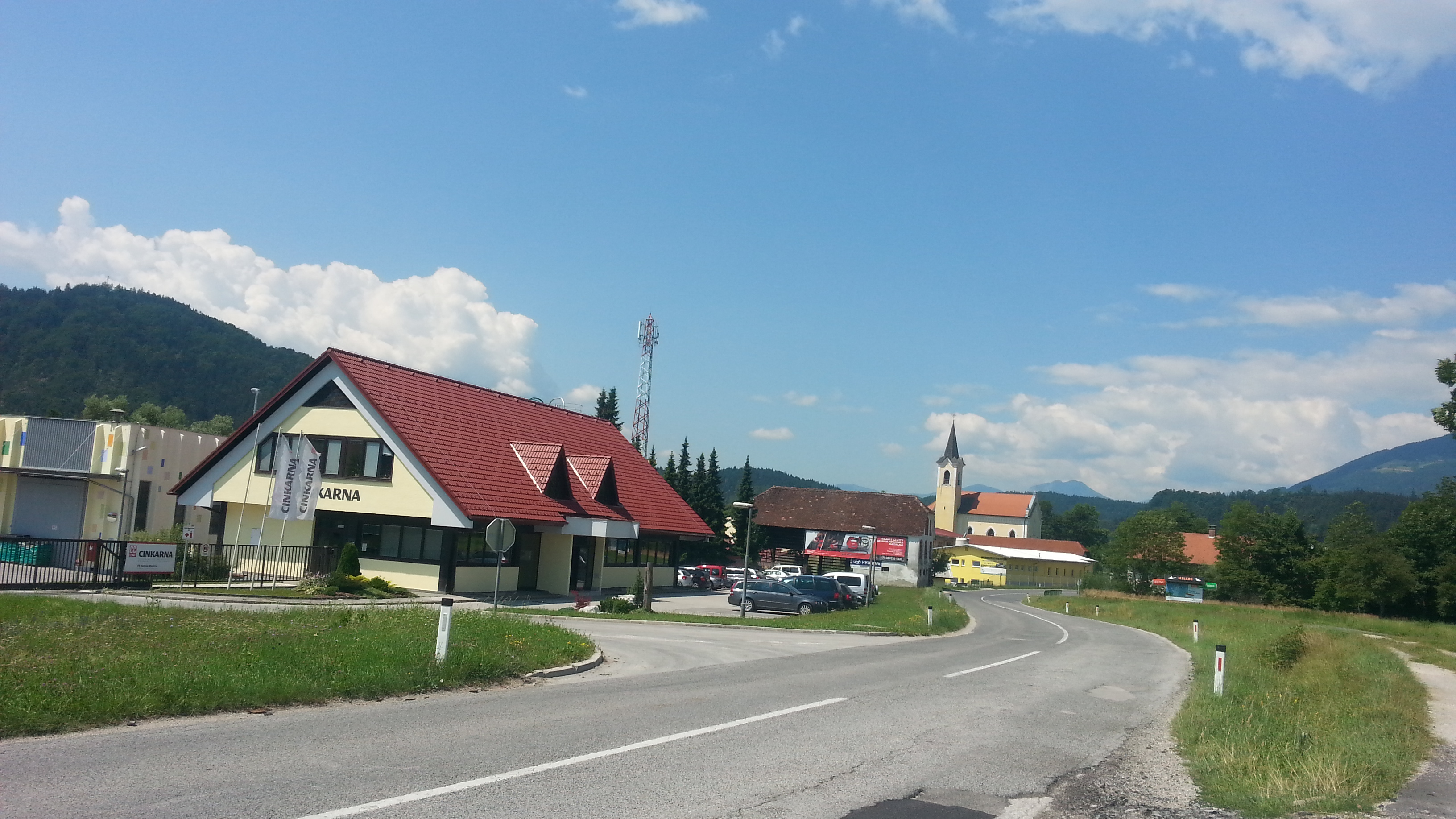 Vas Ljubija v občini Mozirje.